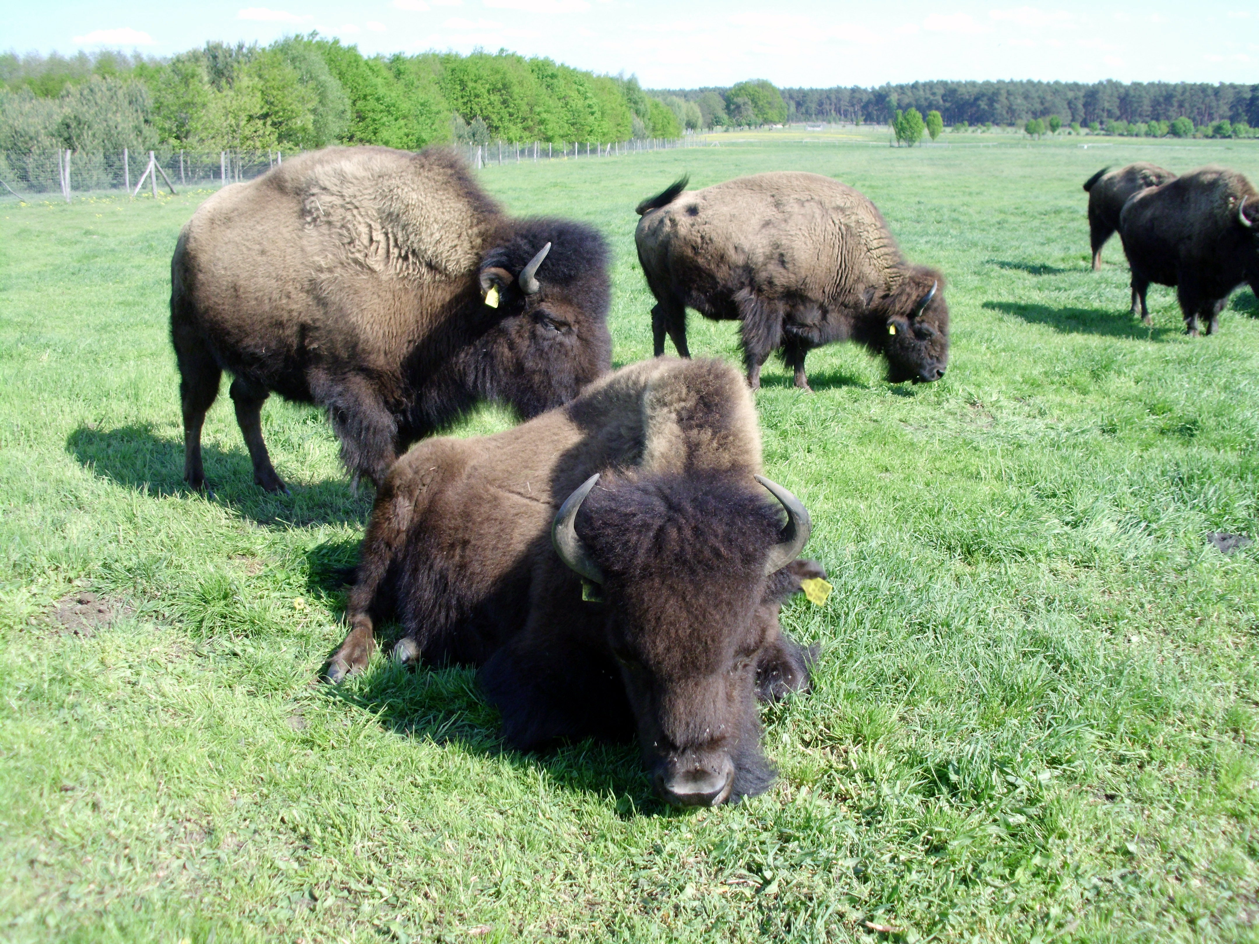 Bisonpark in Krügersdorf, Ortsteil der Stadt Beeskow im Landkreis Oder-Spree in Brandenburg, Deutschland